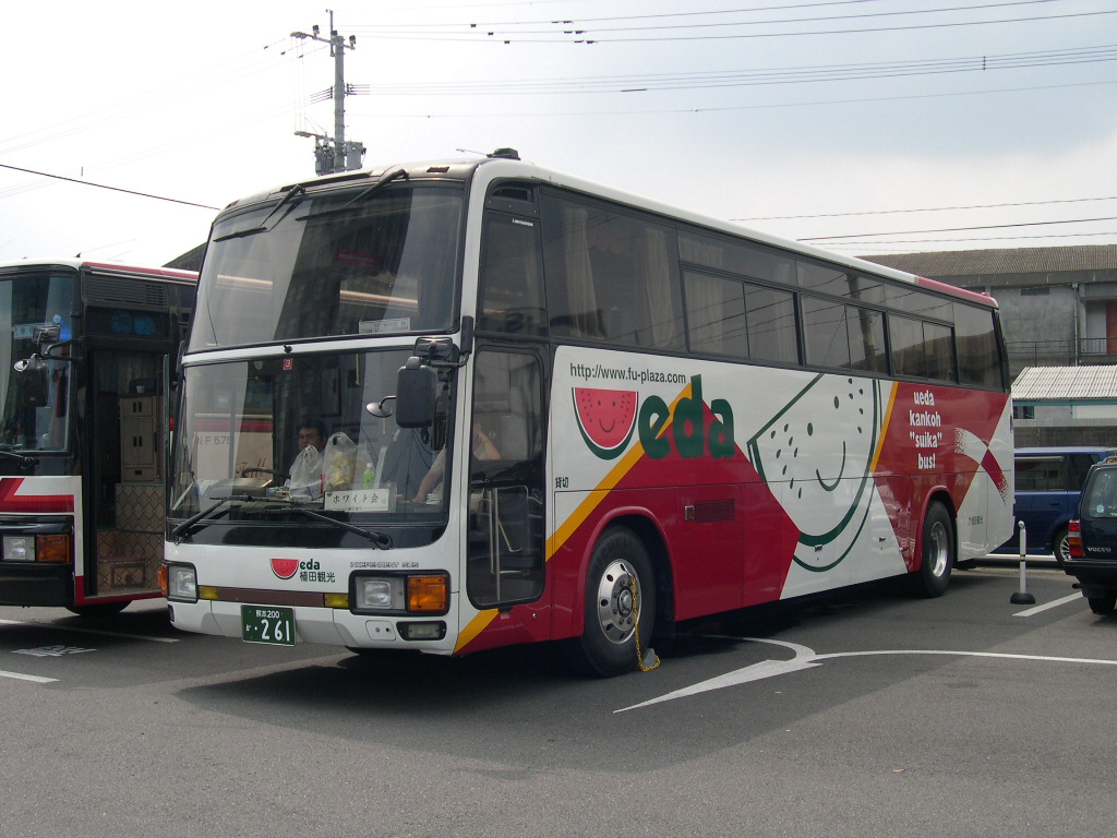 植田観光 撮影場所失念